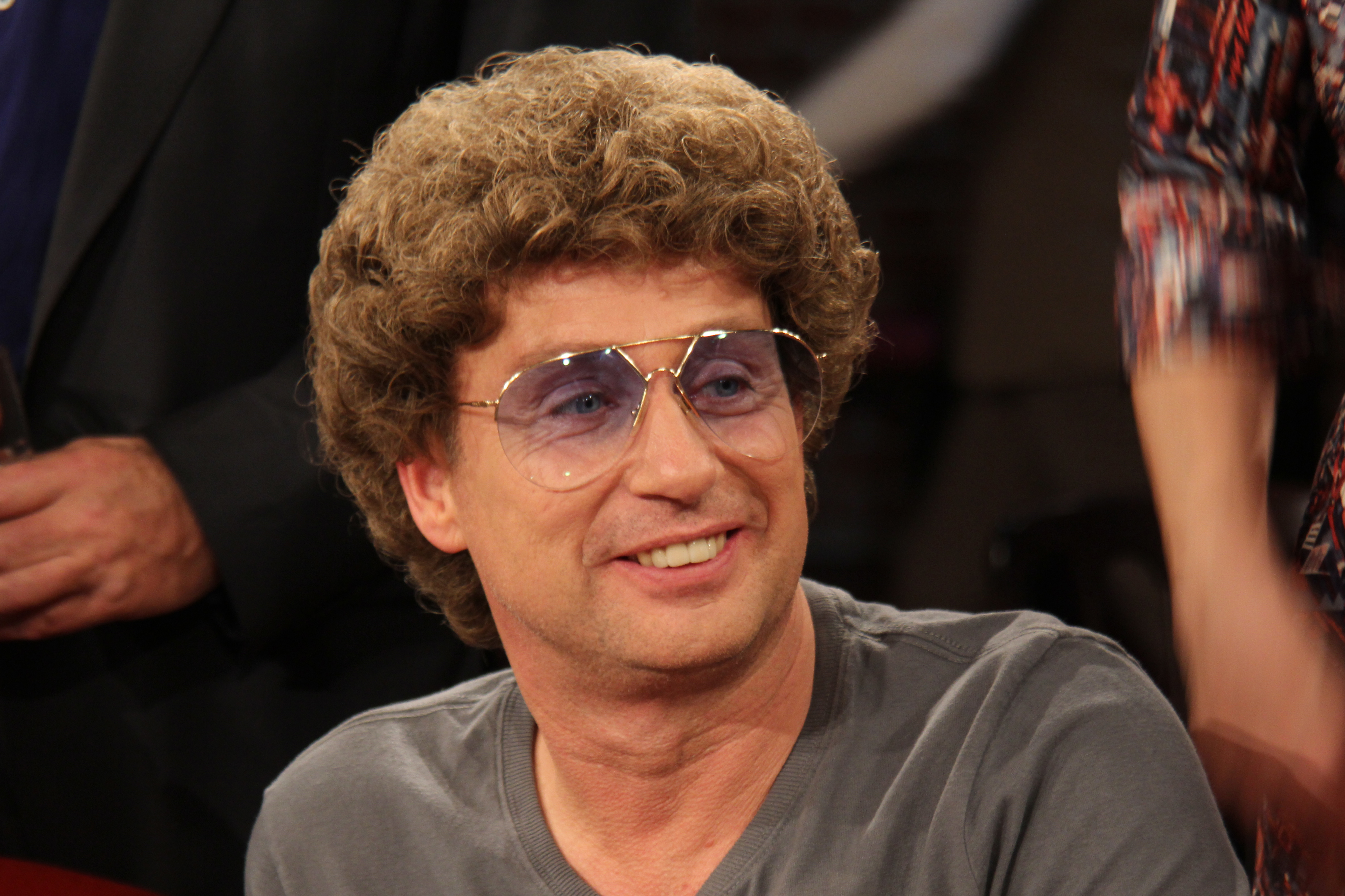 Foto nach der Aufzeichnung des Kölner Treffs, eine Fernsehsendung des Westdeutschen Rundfunks